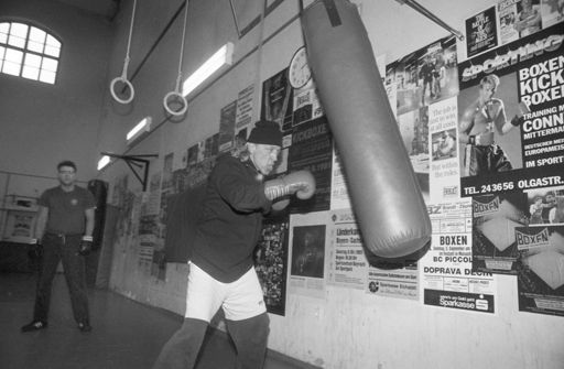 Boxtraining in München. Boxer ist der Barkeeper Charles Schumann.